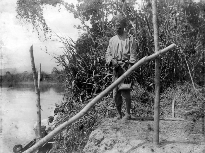 Negatief. Een Alfur in zijn geboortestreek, naast de rivier Wäe Apoe bij de landingsplaats bij Gassit op Boeroe